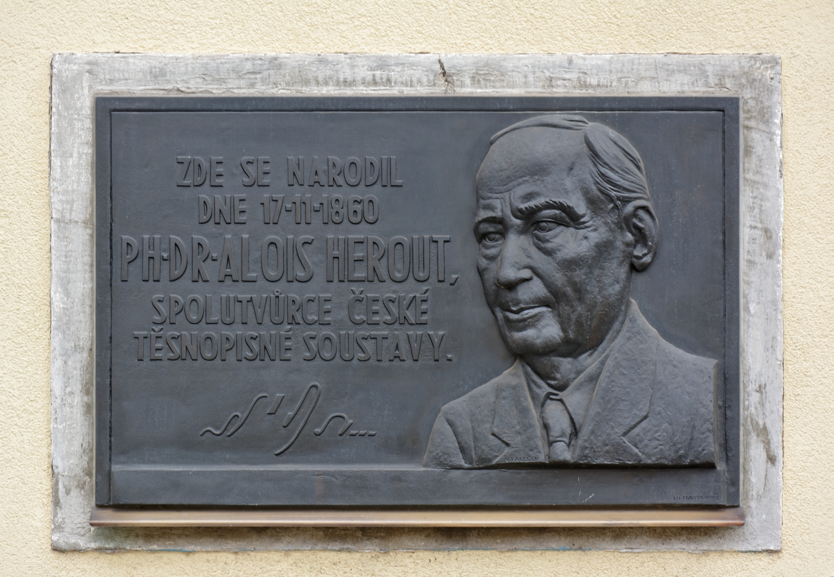 Pamětní deska na rodném domě Aloise Herouta, Beroun, Pivovarská 104/9. Sochař: Václav Paleček, litec: Franta Anýž, rok vzniku: 1943.